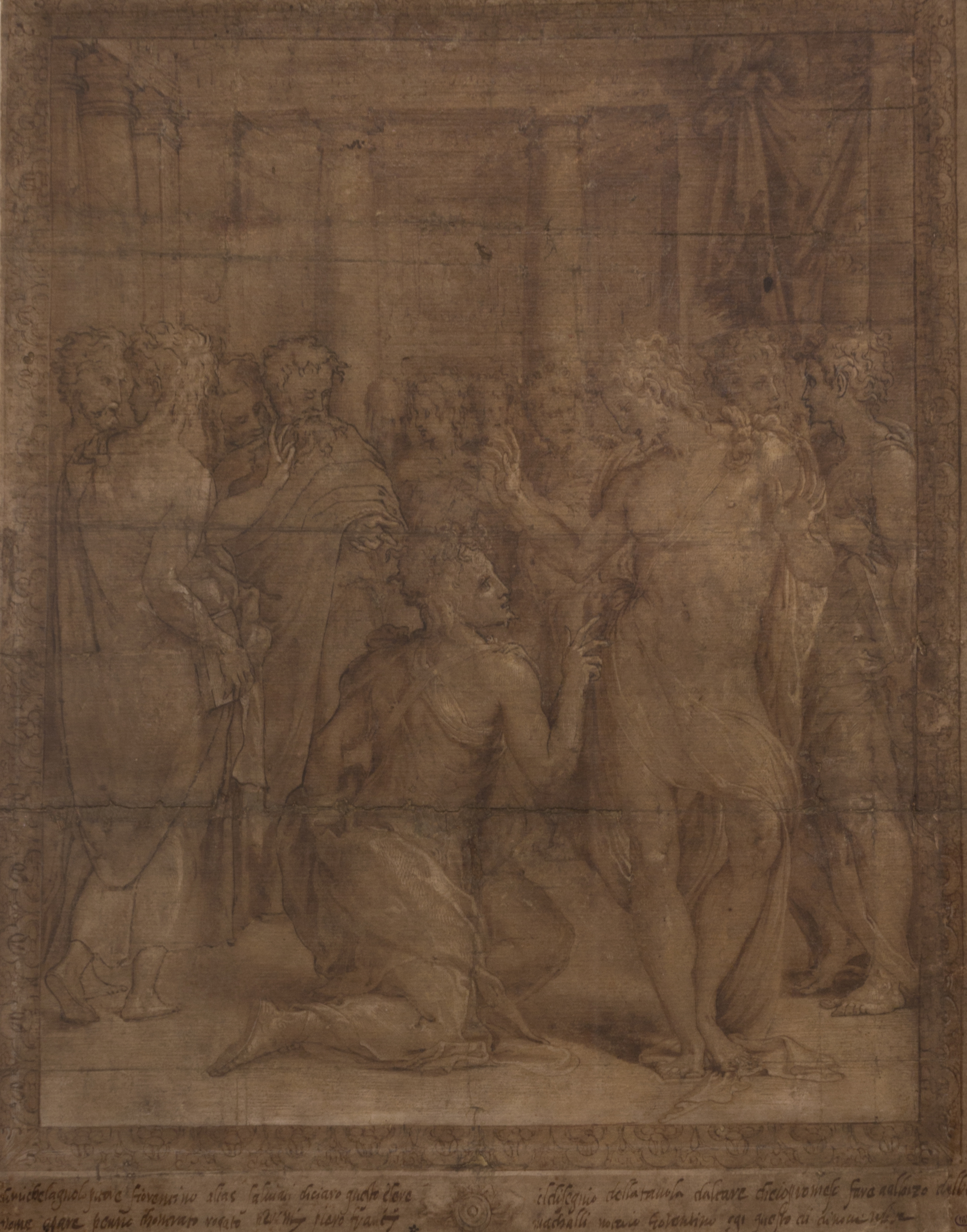 L’Incrédulité de saint Thomas Pierre noire, plume et encre brune, lavis brun, avec rehauts de blanc, sur papier. Mis au carreau à la pierre noire. Entièrement repris à la plume et à l’encre brune ; passé au vernis.